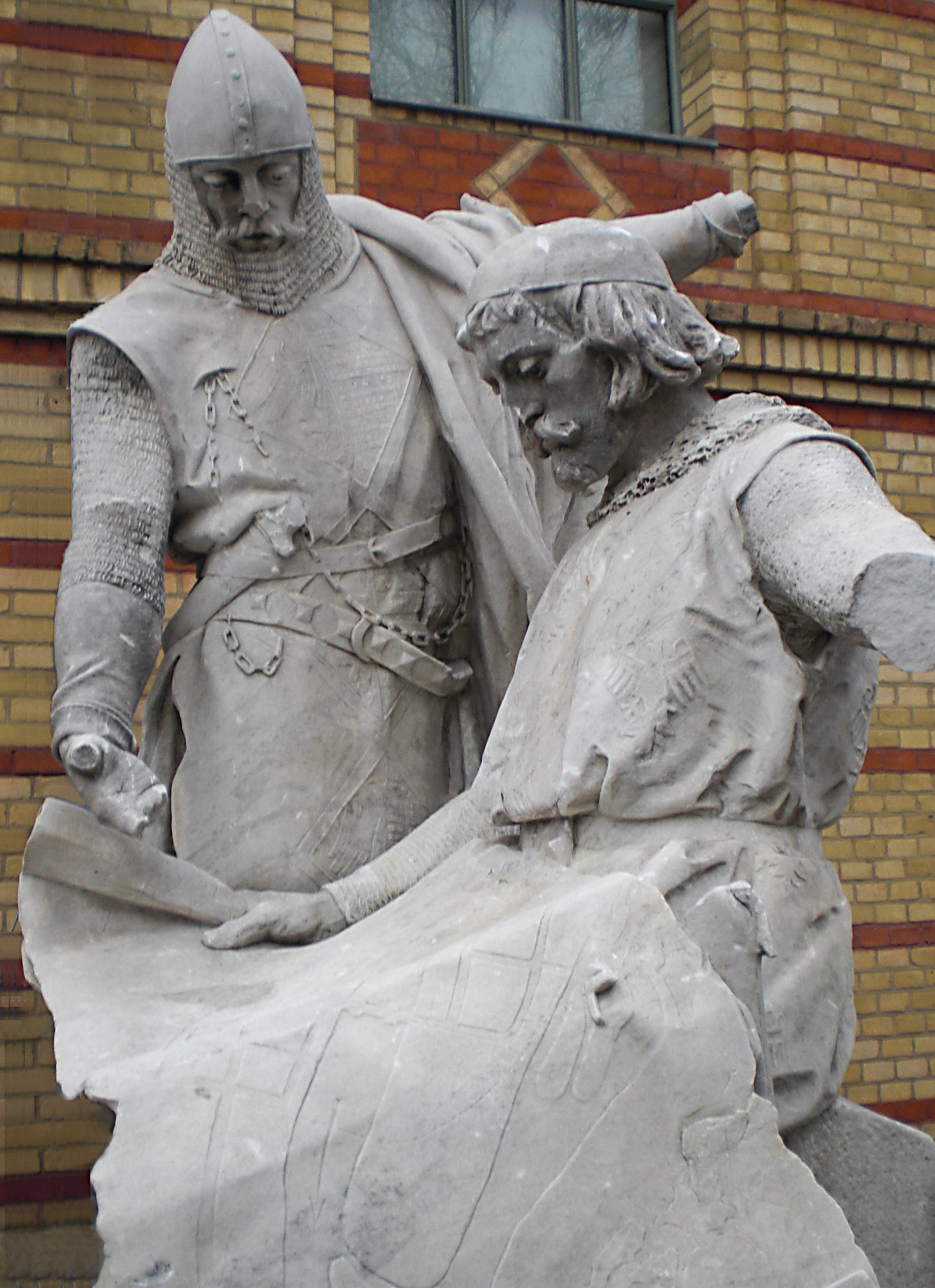 Zentrales Doppelstandbild der gemeinsam regierenden brandenburgischen Markgrafen Johann I. (1213–1266) und Otto III. (ca. 1215–1267), genannt "die Städtegründer", aus der Denkmalgruppe 5 der ehemaligen Berliner Siegesallee. Die Brüder betrachten den Stadtplan der von ihnen mit Stadtrecht bewidmeten Doppelstadt Berlin-Cölln. Bildhauer: Max Baumbach, Enthüllung 22. März 1900. Otto auf der linken, Johann sitzend auf der rechten Seite. Hier in der Zitadelle Spandau im November 2009, vor der Restaurierung des Standbilds.